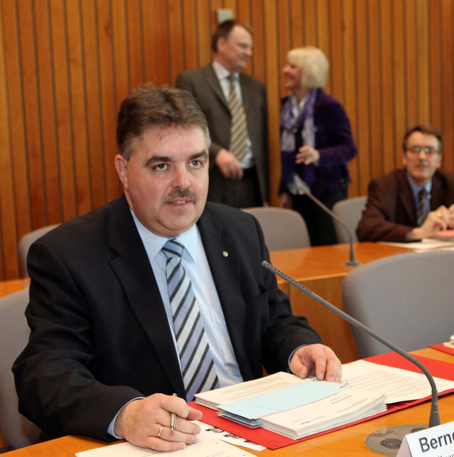 Bernd Krückel in einer Sitzung des Haushalt und Finanzauschusses 2019